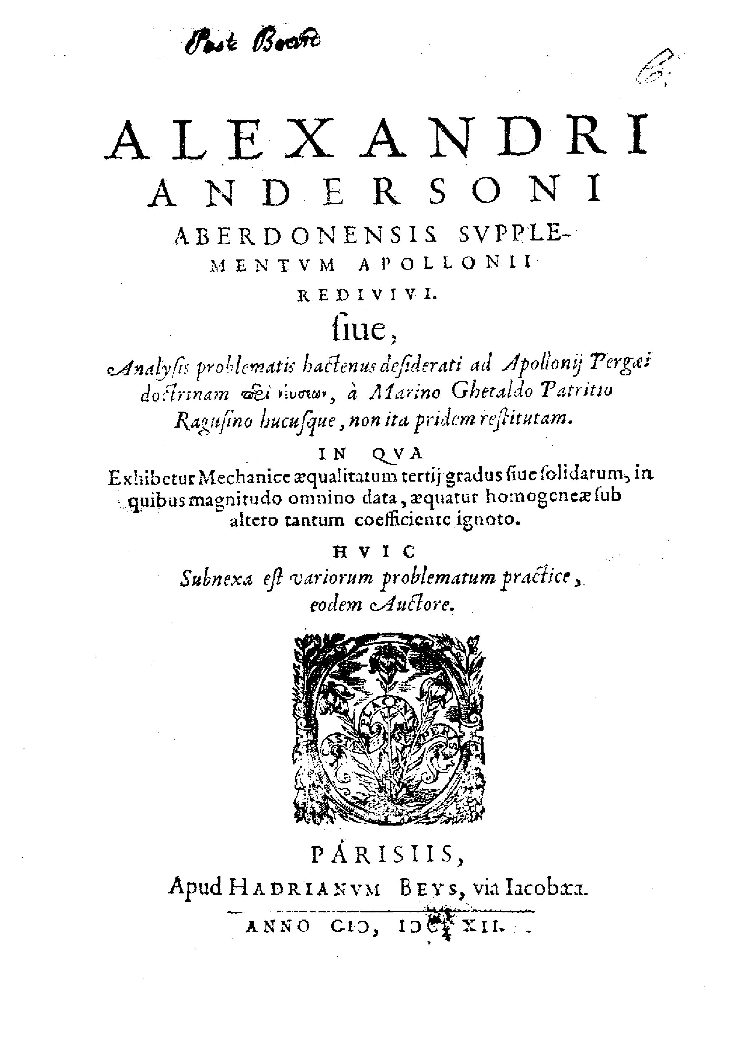 Frontespizio